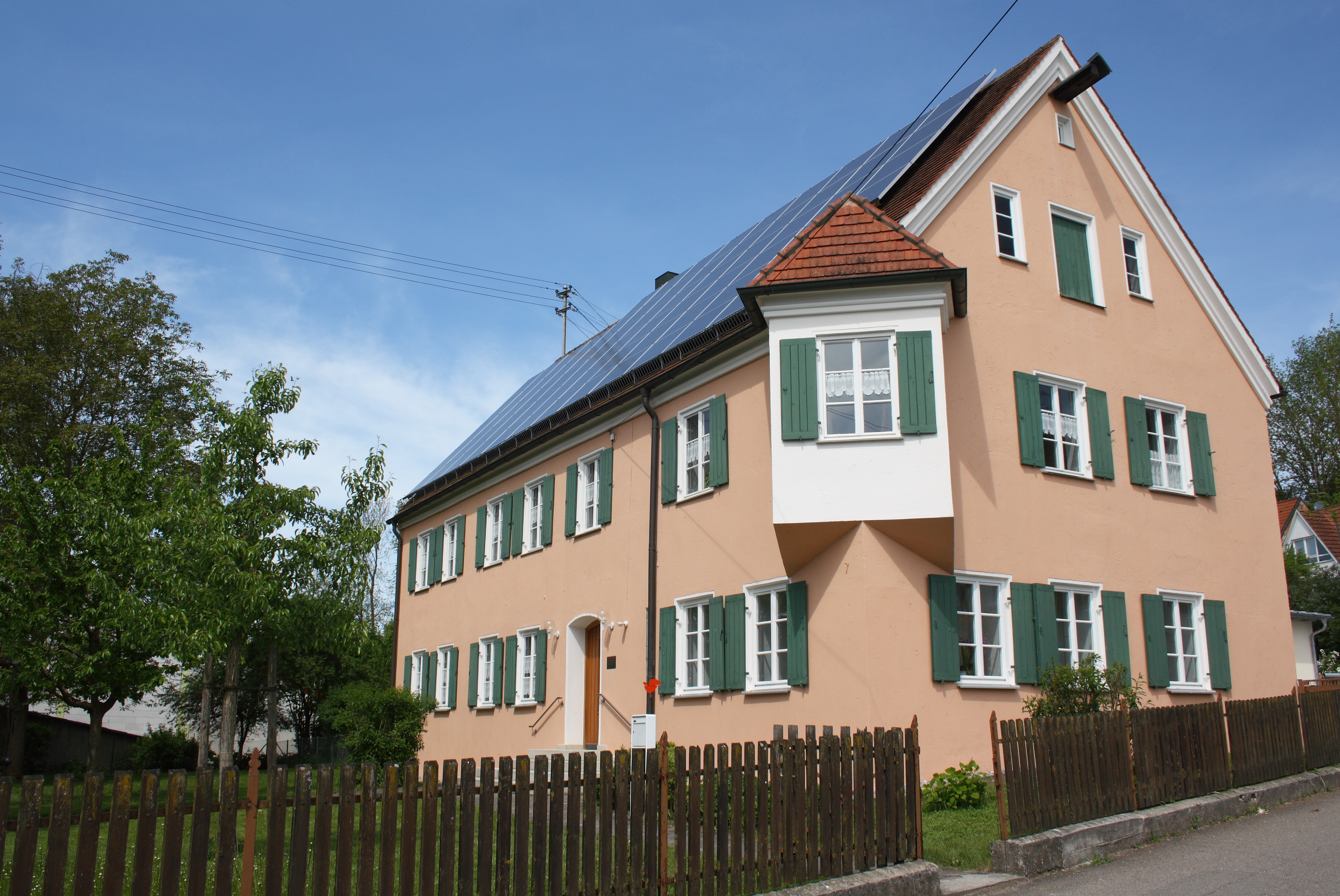 Pfarrhaus in Haunsheim, einer Gemeinde im Landkreis Dillingen an der Donau (Bayern)